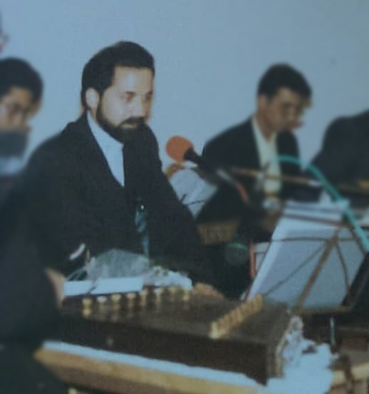 احد جنگ‌زاده - کنسرت شاهین‌شهر اصفهان - ۱۳۷۹